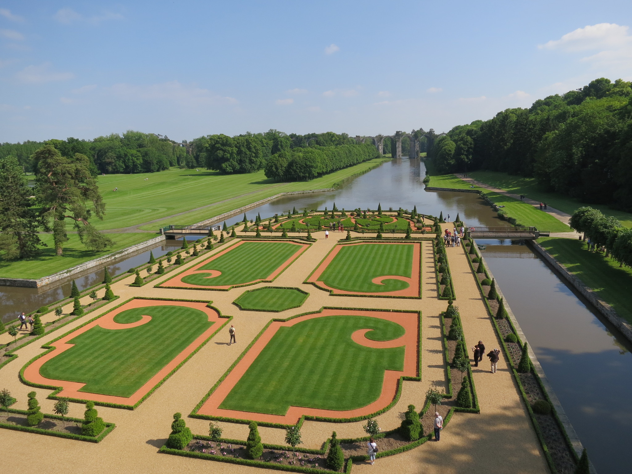 Le jardin à la française du château de Maintenon, réalisé en 2013 par le conseil général selon des plans d'André Le Nôtre jamais réalisés jusqu'alors.